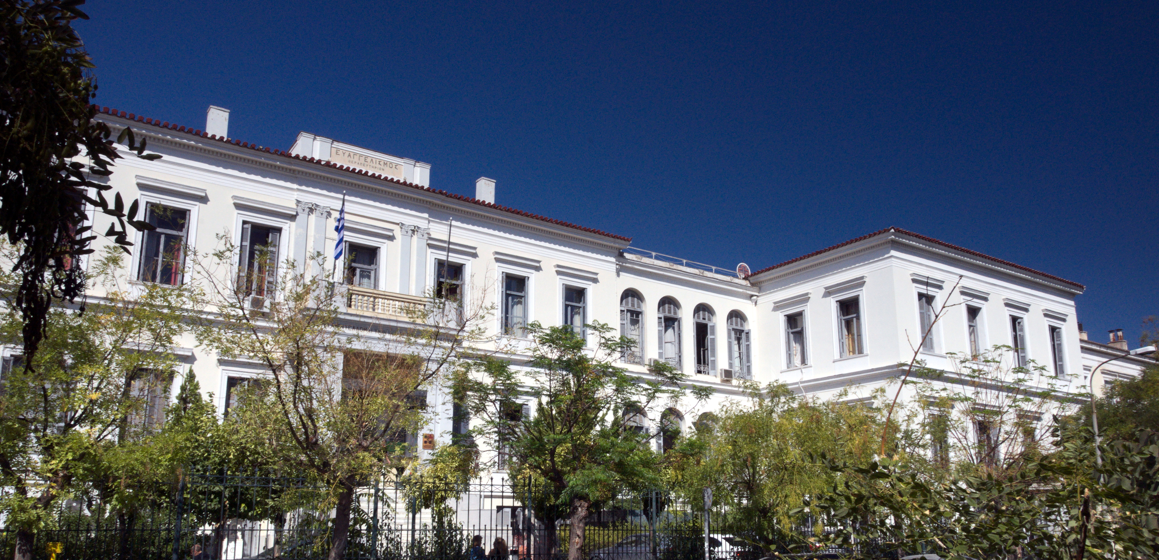 Νοσοκομείο "Ευαγγελισμός"«Νοσοκομείο Ευαγγελισμός»